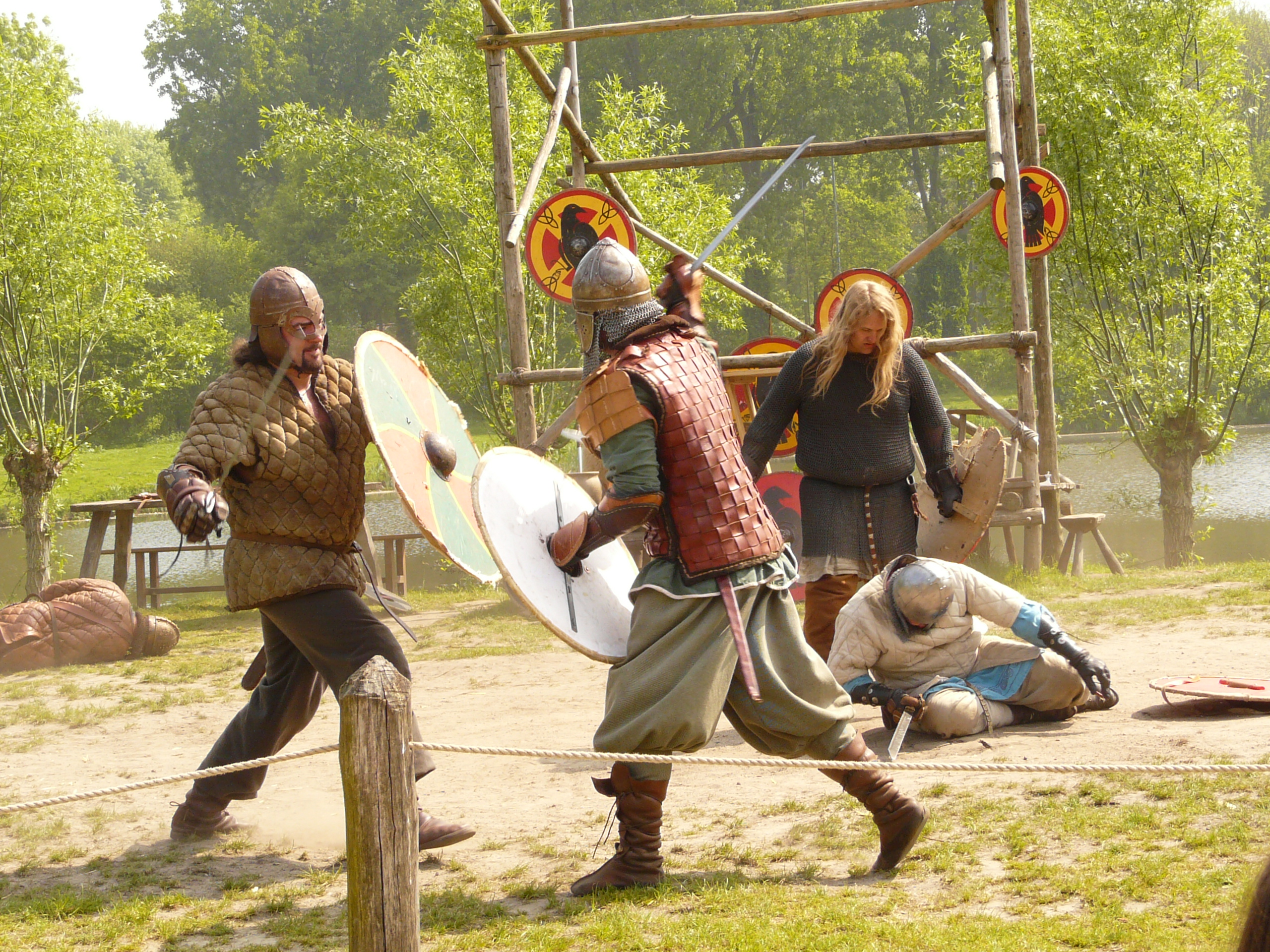 Wikingerzeitliche Kampfvorführung im Historisch Openluchtmuseum Eindhoven